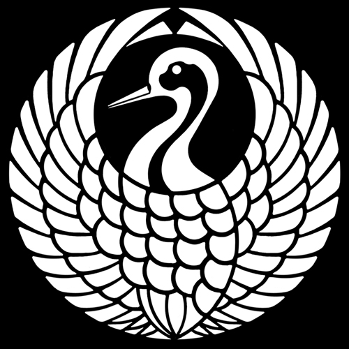 「鶴の丸」紋（染抜）